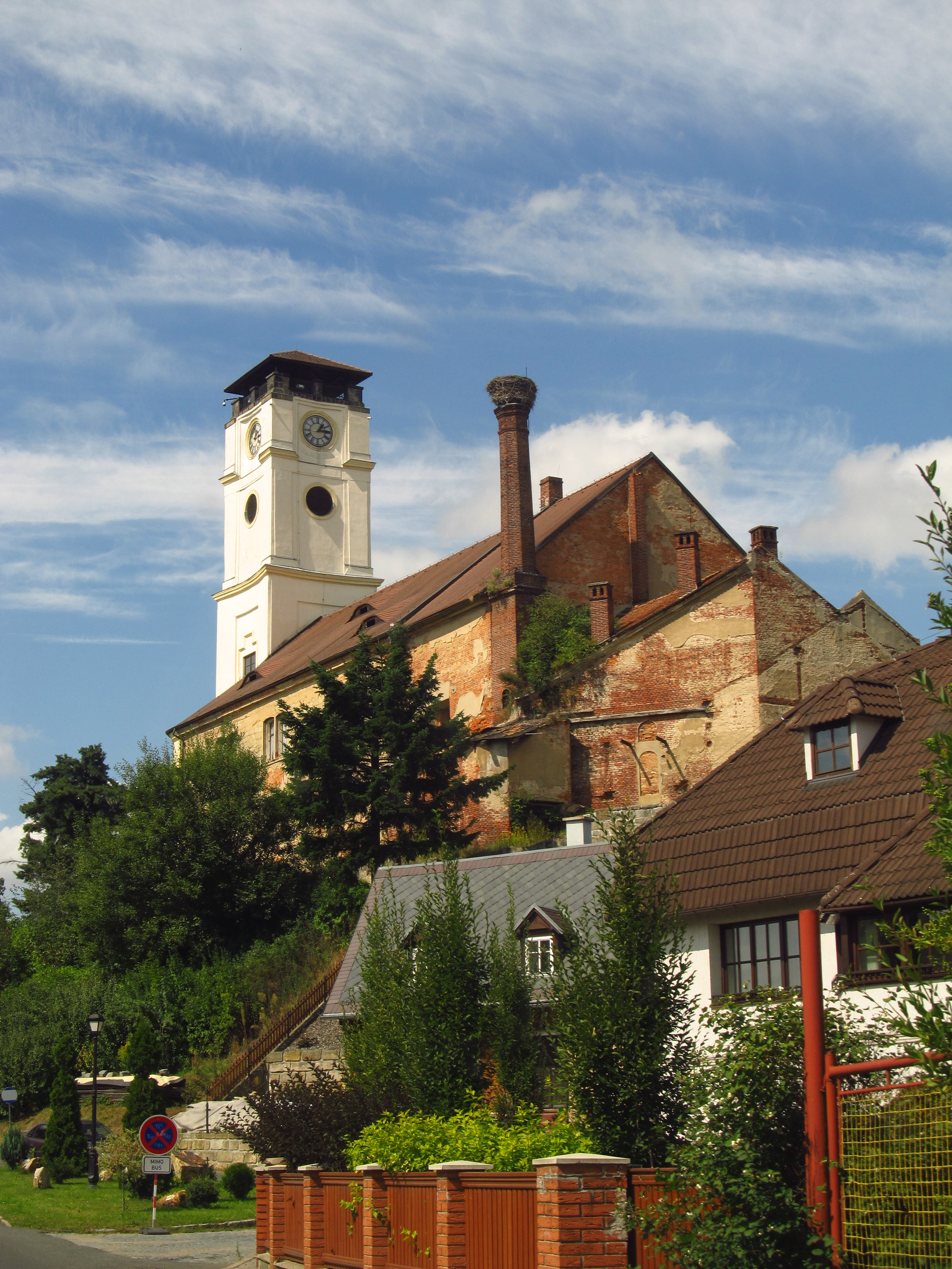 Kostel P. Marie (Jablonné v Podještědí), JZ od náměstí, Jablonné v Podještědí